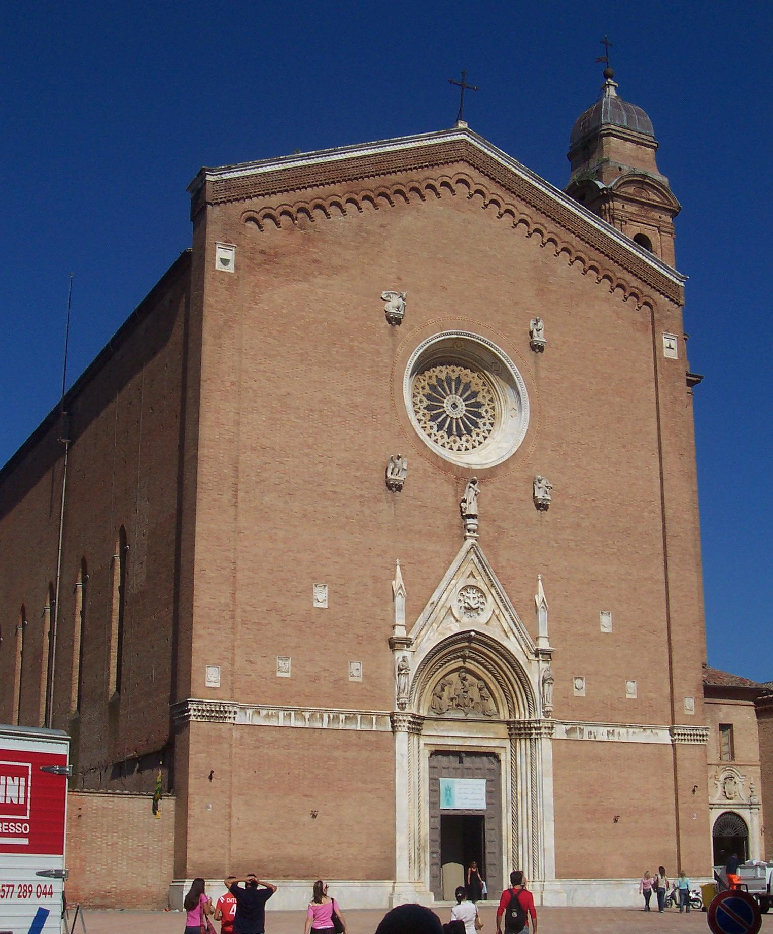 Foto di Gabriele Lupi